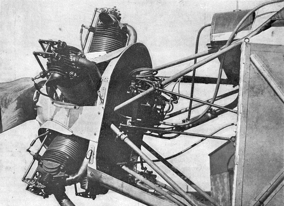 Detail montáže motoru Walter NZ-60 do letounu Focke-Wulf S 24 "Kiebitz"